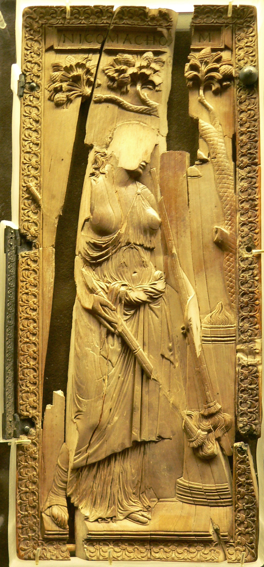 Feuillet d'un diptyque des Nicomaques et des Symmaques : prêtresse de Cérès accomplissant un rite en l'honneur de Cybèle. Ivoire, œuvre italienne (de Rome ?), vers 400 ap. J.-C. Provenance : puits de l'abbaye de Montier-en-Der, diocèse de Langres (Haute-Marne). L'autre feuillet est conservé au Victoria and Albert Museum de Londres.